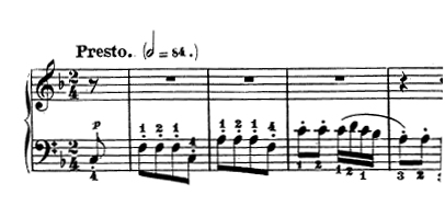 Compassos iniciais do terceiro movimento da Sonata para piano n.º 6, Op. 10 nº 2 de Ludwig van Beethoven